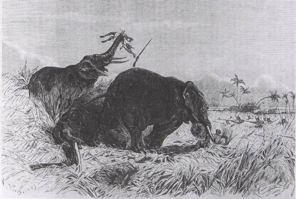 Gbeto, en elitetrupp blant «amasonene», den kvinnelige hæren i Dahomey, ca. 1625–1800-tallet